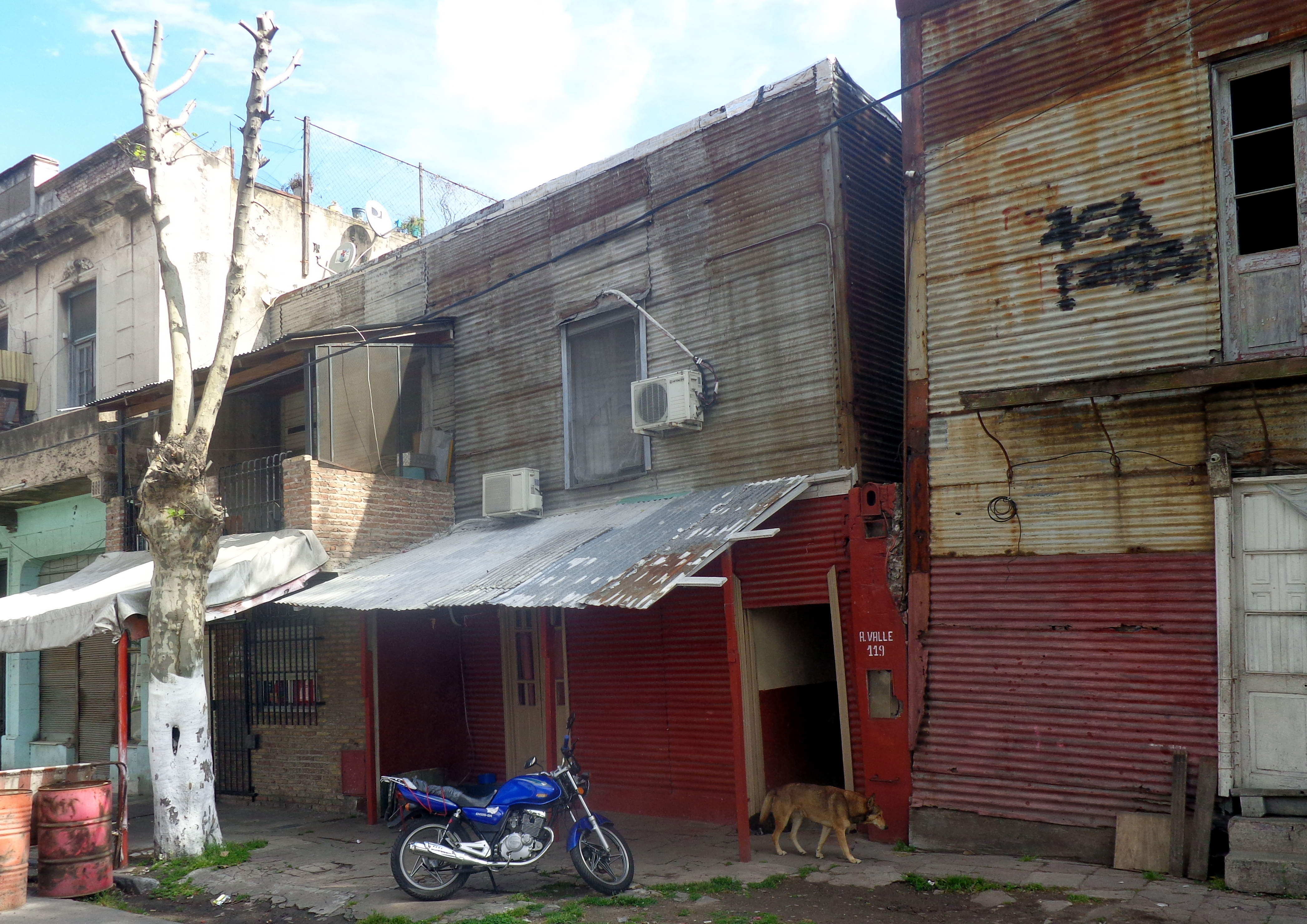 Argentino Valle 119: Aquí se filmó parte de la película Argentina "La Mary". Isla Maciel, Dock Sud, Partido de Avellaneda, Provincia de Buenos Aires, Argentina.